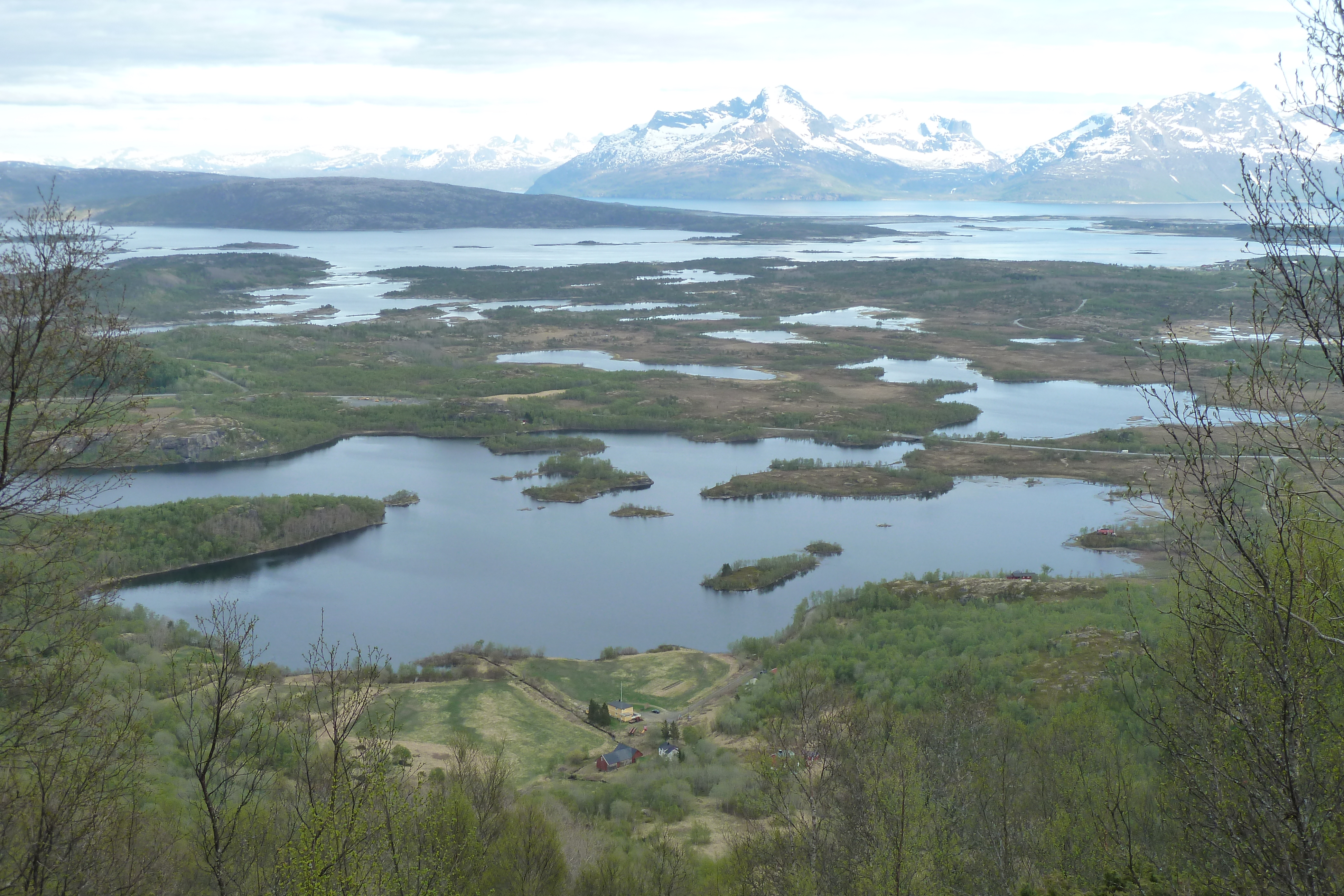 Fjellvatnet, Steinslandsvatnet, Sagfjorden og deler av Finnøy i Hamarøy kommune.